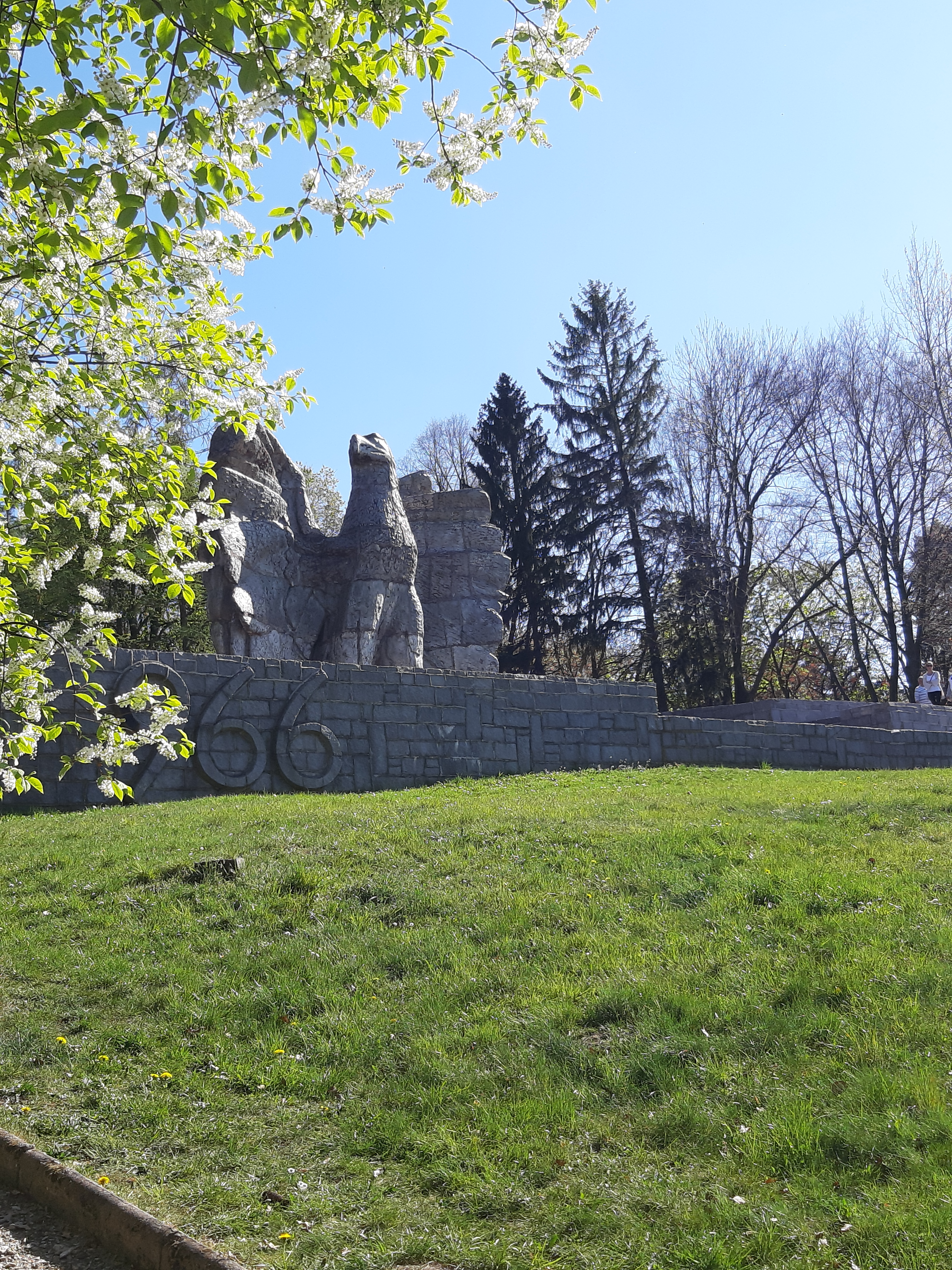 Die größte Keramikstatue Europas.